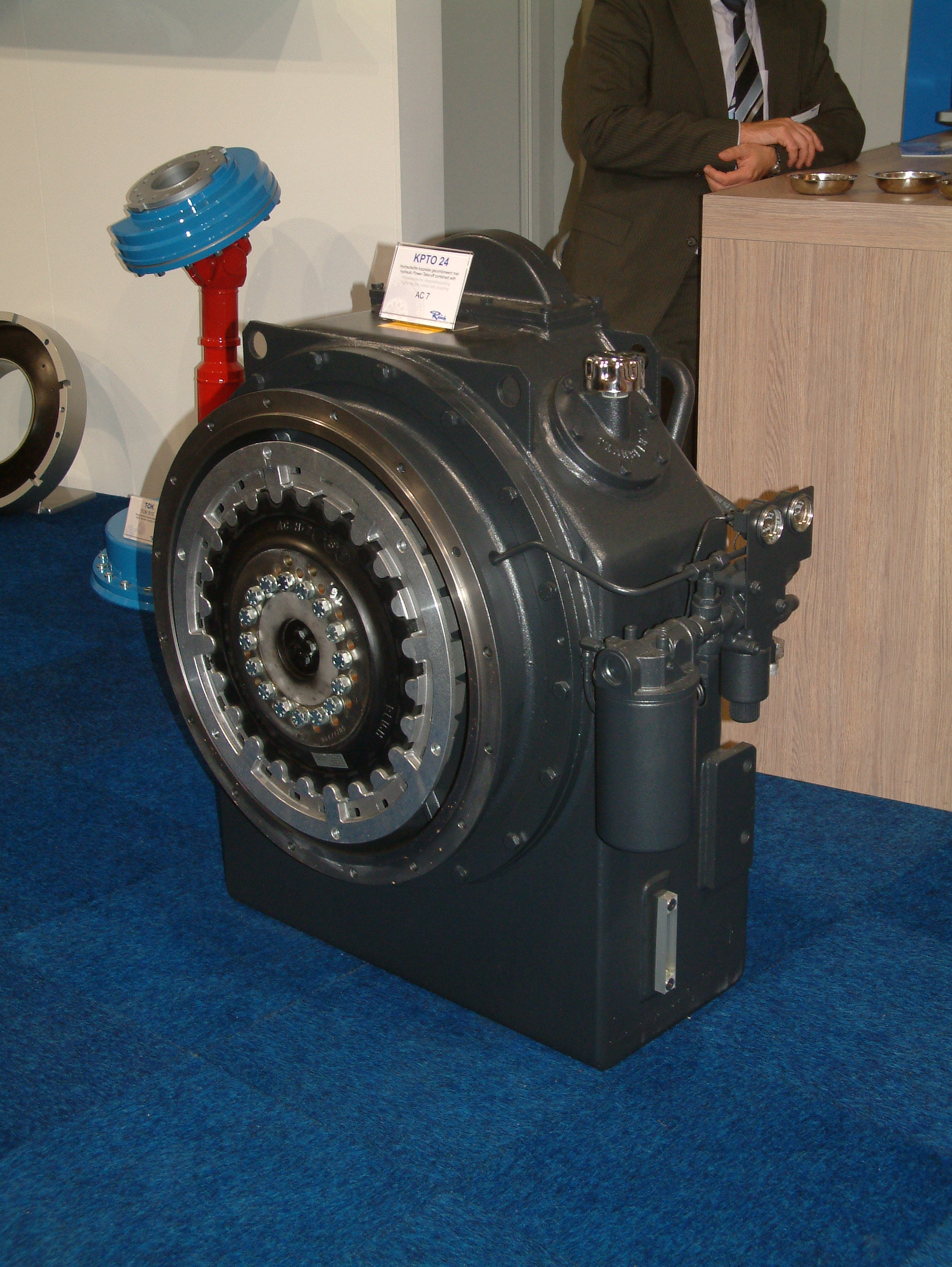 Europort 2009